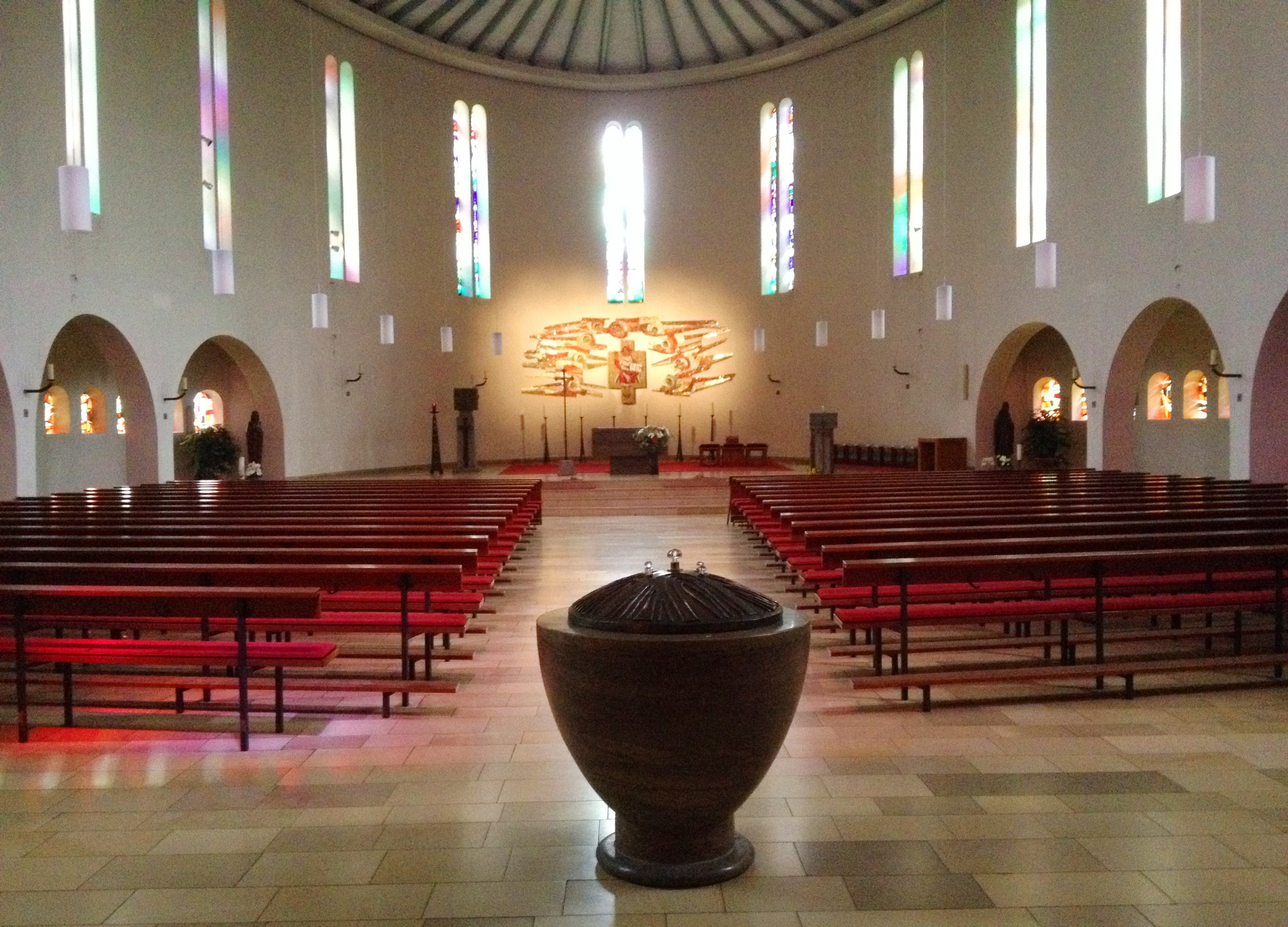 Varel, kath. Pfarrkirche St. Bonifatius